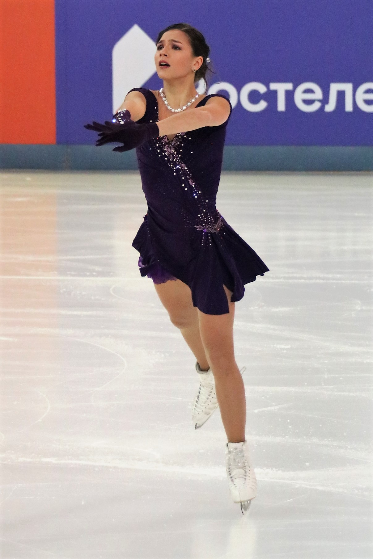 Станислава Константинова на чемпионате России по фигурному катанию на коньках 2019